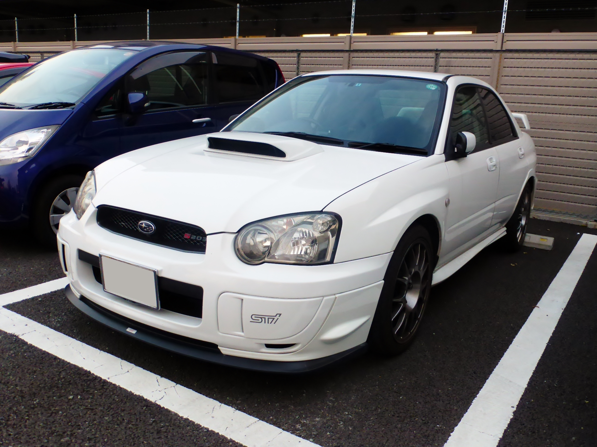 GDBE型スバル・インプレッサS203をフロントから撮影。